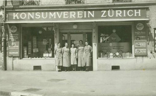 Konsumverein Zürich, Stadt Zürich ZH, Schweiz